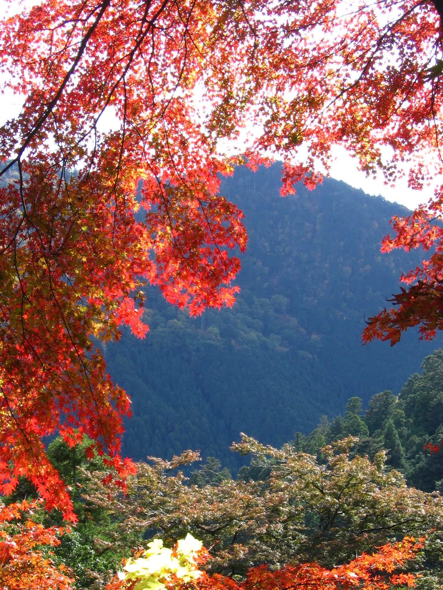 Photo de momiji (couleurs d'automne) prise à Kurama (Kyoto), le 19/11/2005.